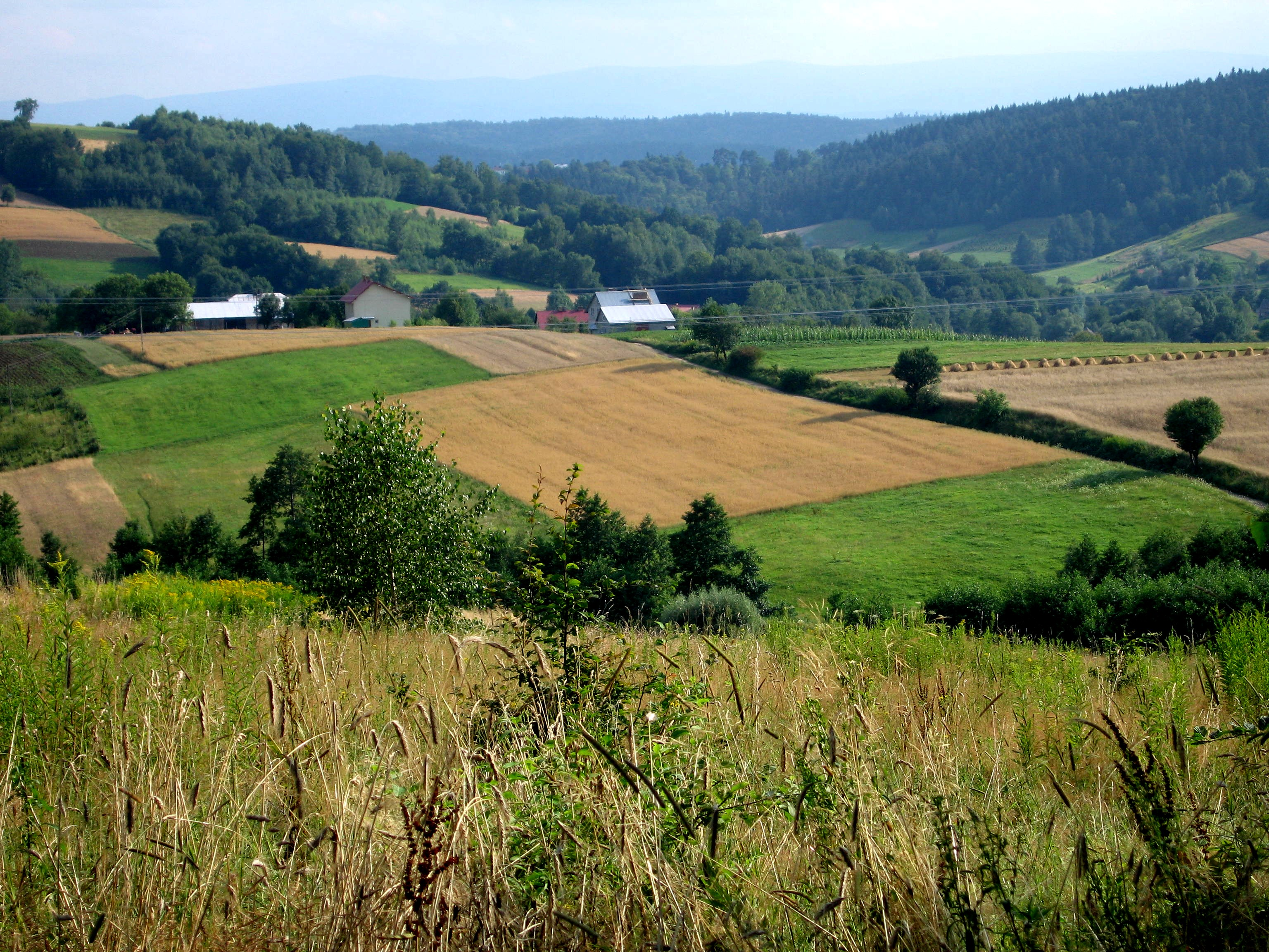 Panorama Sowiny